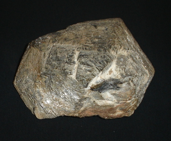 Corindom